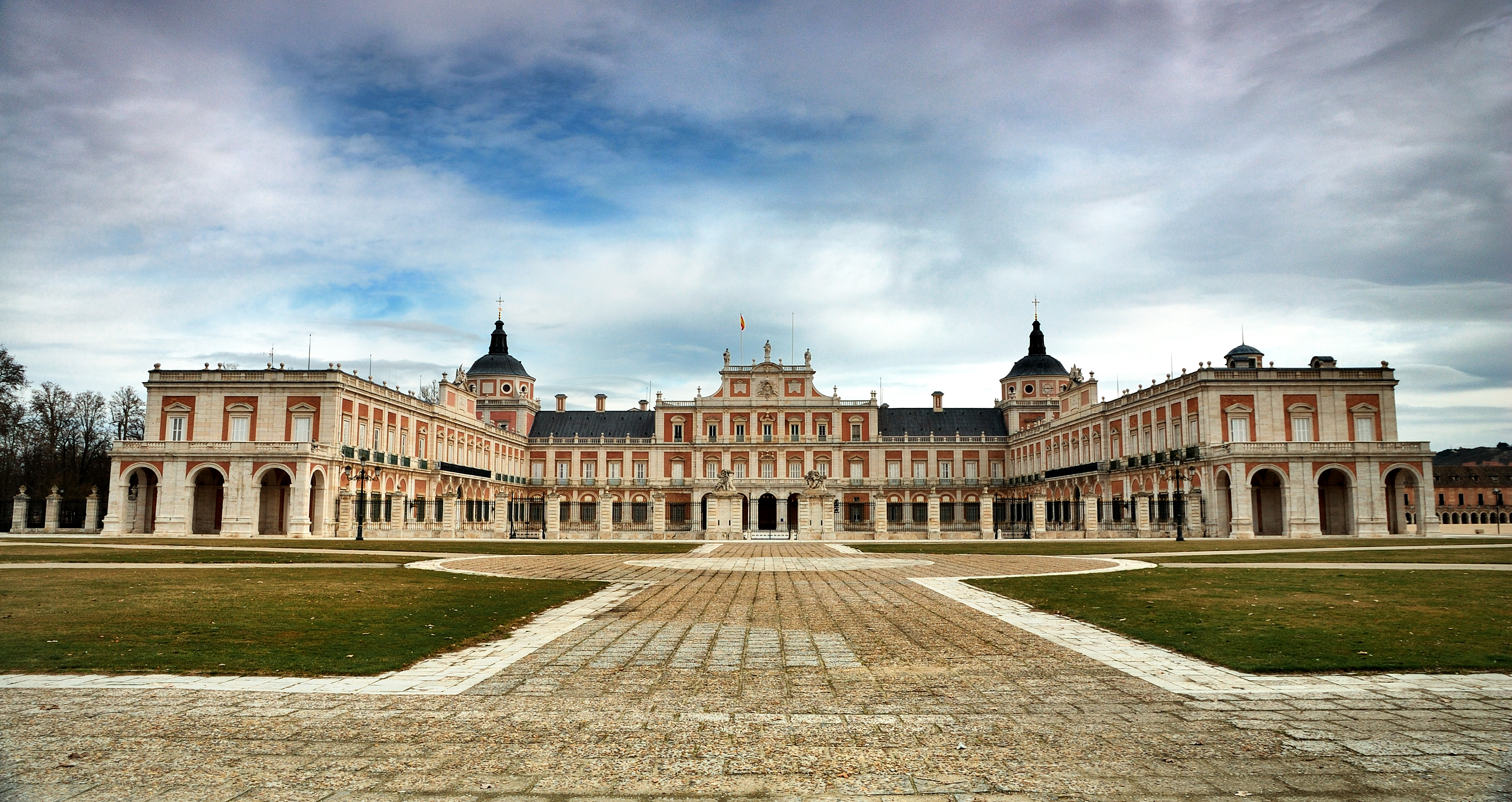 Cámara:Nikon D60 Exposición:0,006 sec (1/160) Aperture:f/7.1 Lente:16 mm Lente:16.3 mm Velocidad ISO:100 Tendencia de exposición:0 EV Flash:No Flash